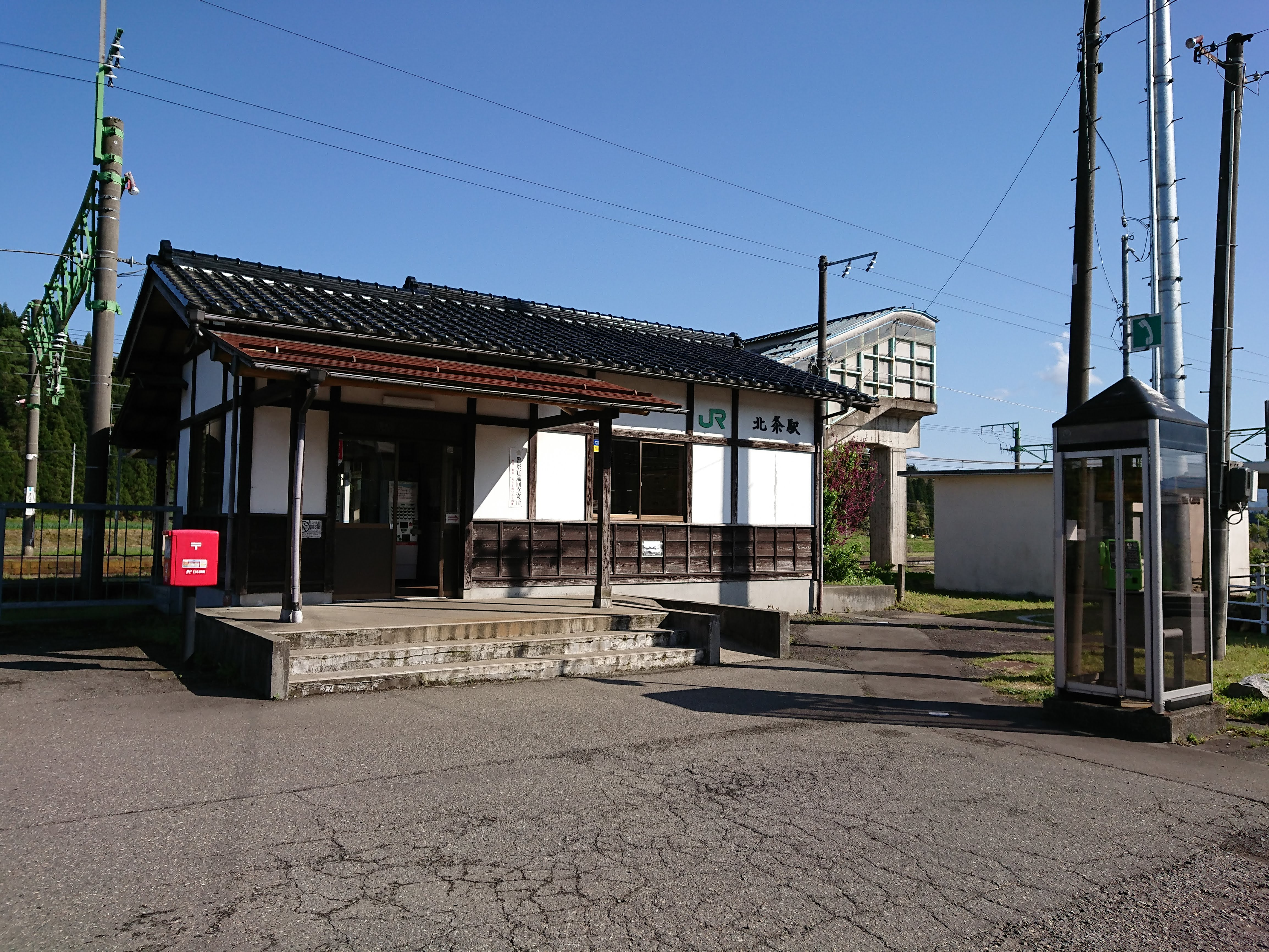 北条駅の外観